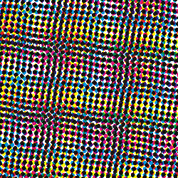 квадратная структура муара